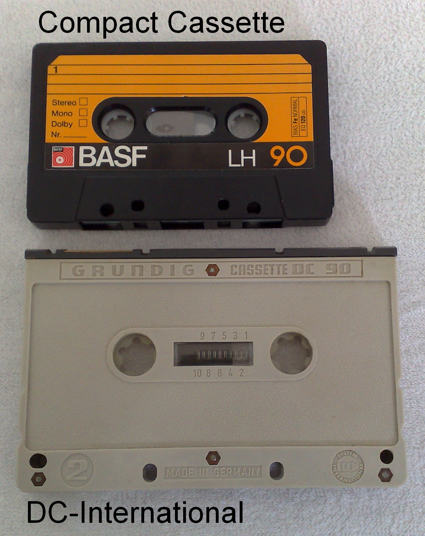 Vergleich zwischen einer Compact Cassette und einer DC-International Kassette